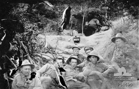 Grupo de diggers del ANZAC en un descanso. Imperio Otomano: Turquía, Gallipoli, Área Anzac (Gallipoli)